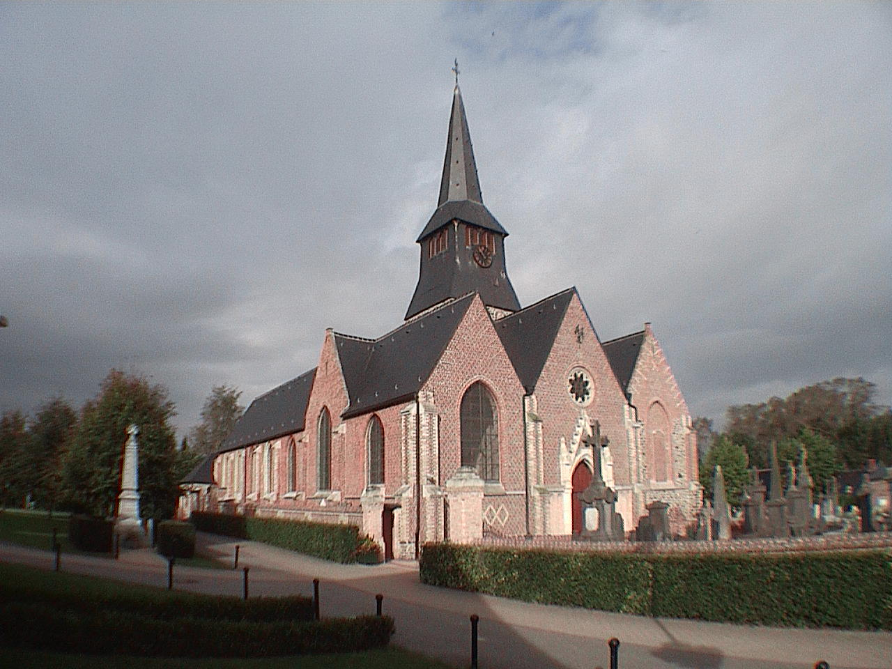 L'église de Terdeghem (Nord)